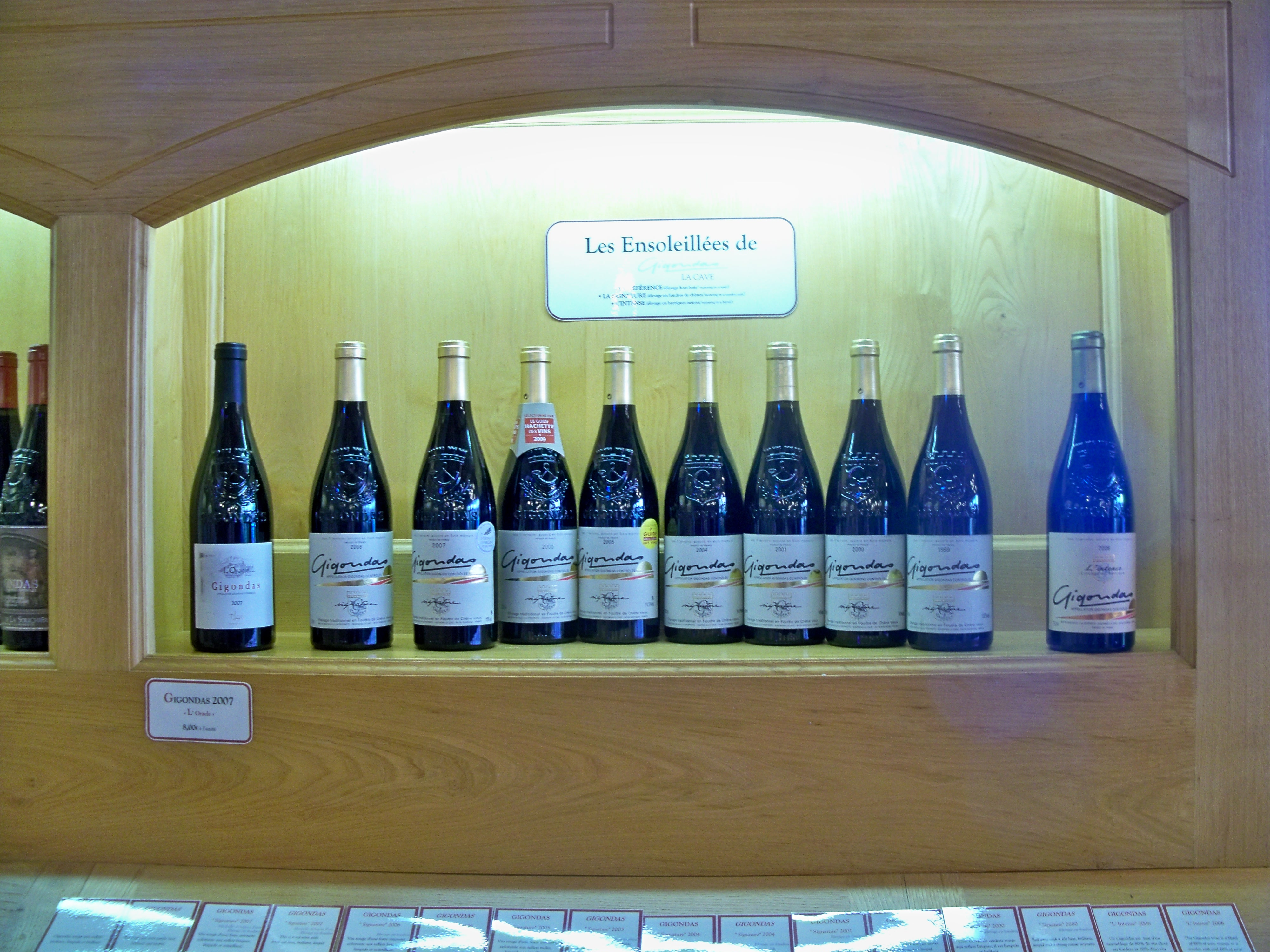 Bouteilles de Gigondas, Vaucluse